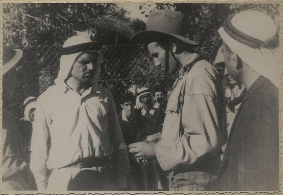 רפי קוצר לוחם בהגנה הקים במלחמת העצמאות את גדוד הקומנדו של חטיבת גולני , במבצע חירם